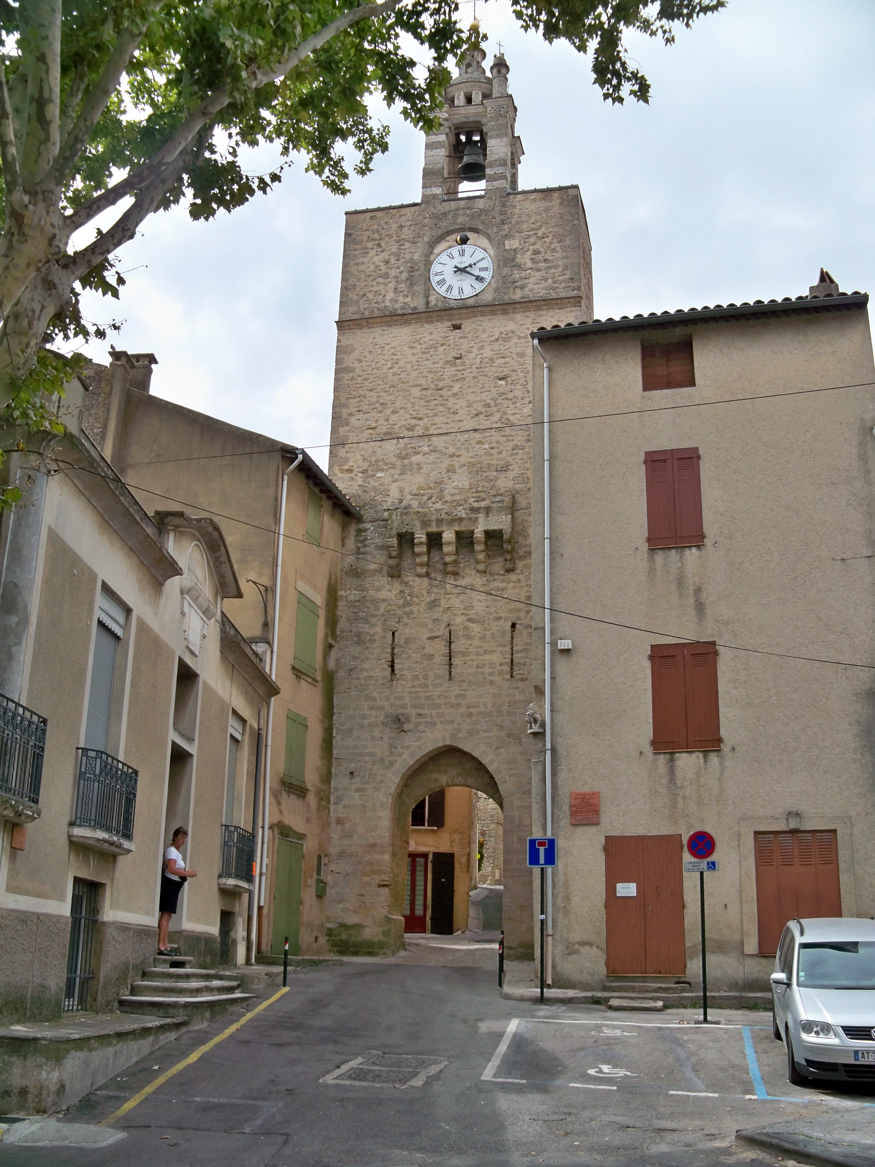 beffroi de Cucuron (84)